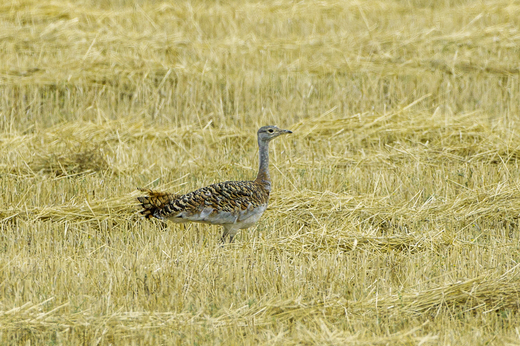 Great Bustard Otis tarda, female, Castuera, Estremadura.